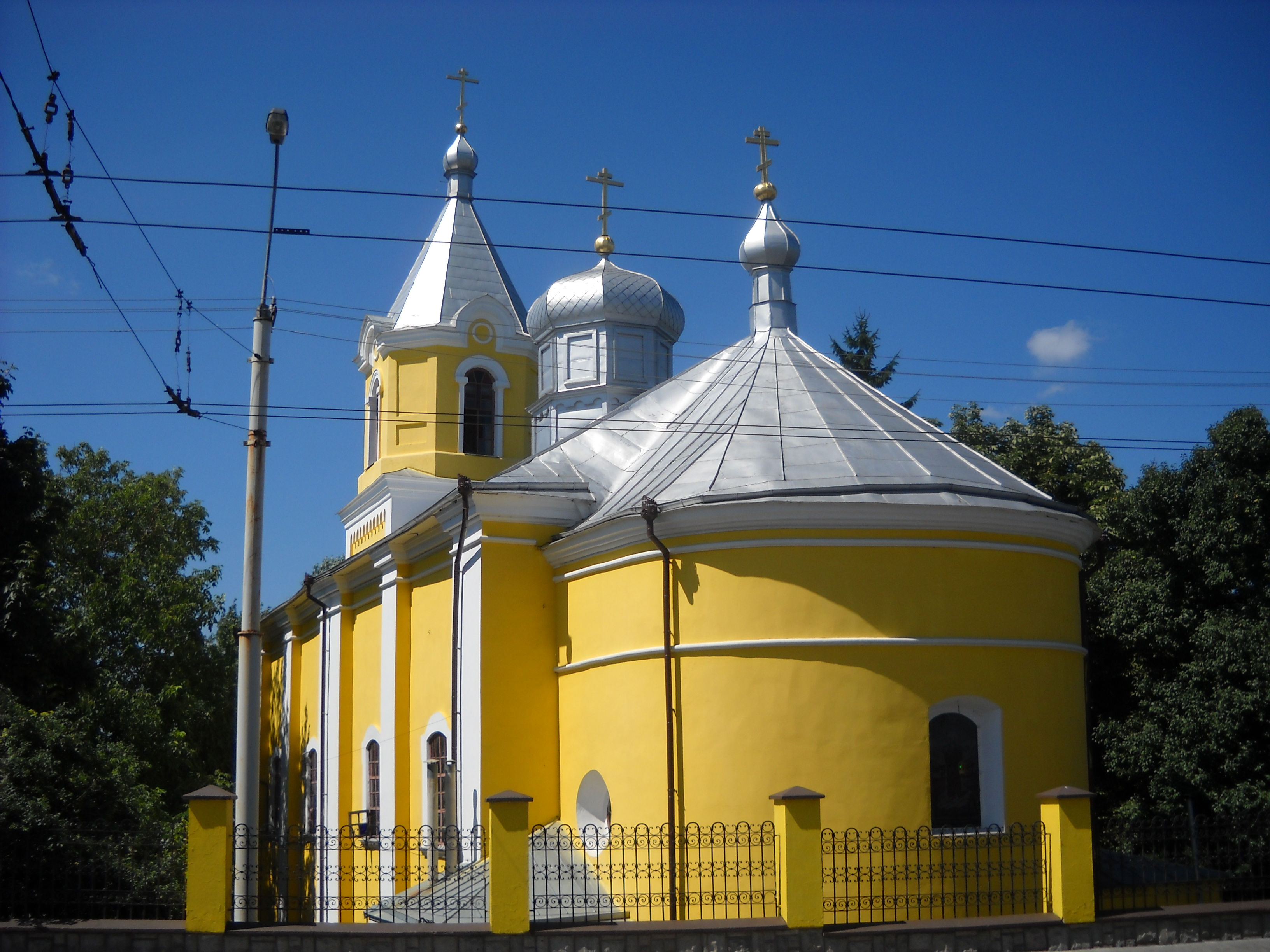 Cerkiew Opieki Matki Bożej w Łucku